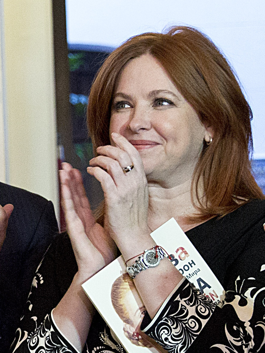 Buenos Aires, 7 de mayo 2015. Con motivo del 96.º aniversario del nacimiento de Eva Perón. el Museo Evita invitó a las actrices que interpretaron a Evita en cine, teatro y televisión durante estos años. Encabezaron el encuentro Teresa Parodi (ministra de Cultura de la Nación), Mariano Recalde (presidente de Aerolíneas Argentinas), Cristina Álvarez Rodríguez (presidenta del Instituto Nacional de Investigaciones Históricas) y las actrices Anamá Ferreira, Nacha Guevara, Cristina Banegas y Andrea del Boca. Fotos: Silvina Frydlewsky / Ministerio de Cultura de la Nación.